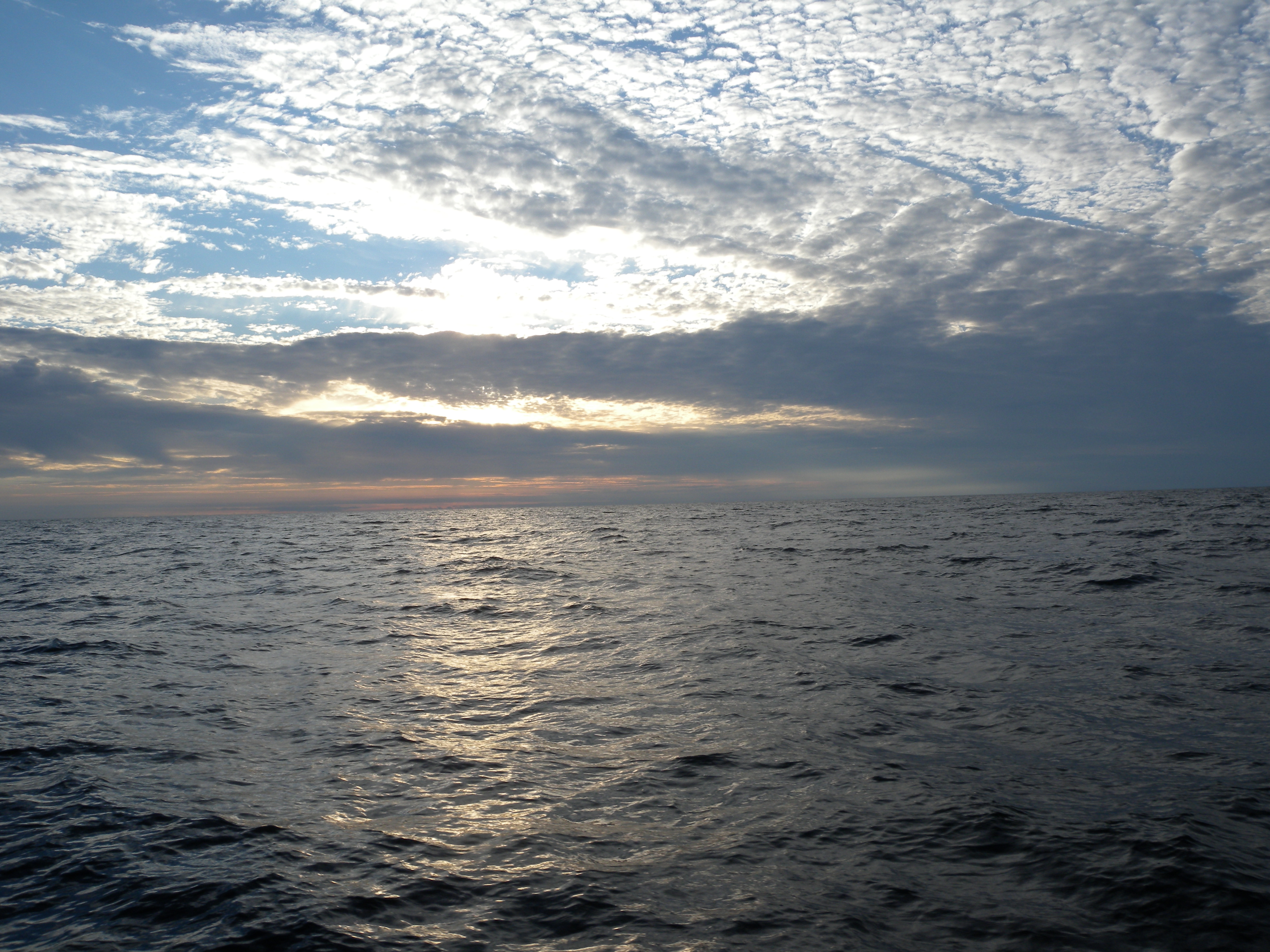 Celtic Sea